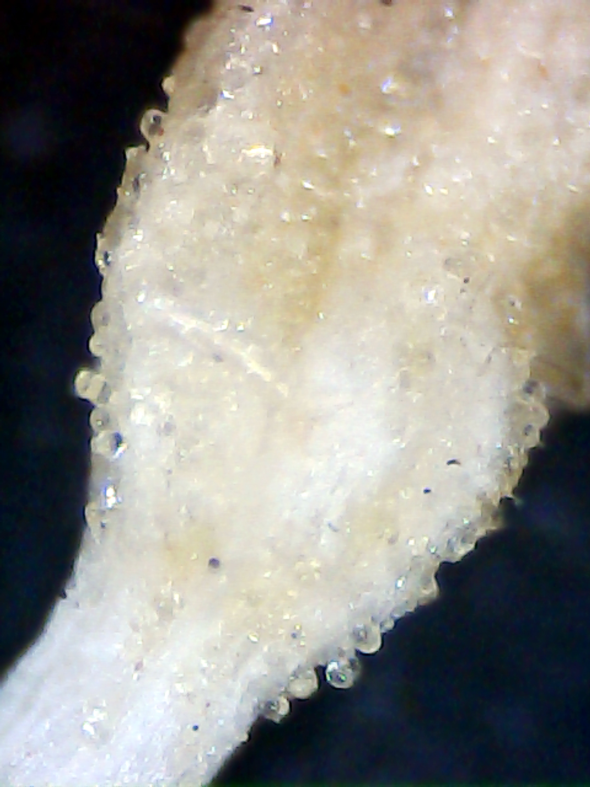 Onopordum nervosum (Cardo gigante) - Base de un flósculo con sus glándulas subsesiles traslucidas - x 80. - Carretera nacional N301, km209,250, Paraje el Carril de la Longaniza, circa La Roda (Provincia de Albacete, España).